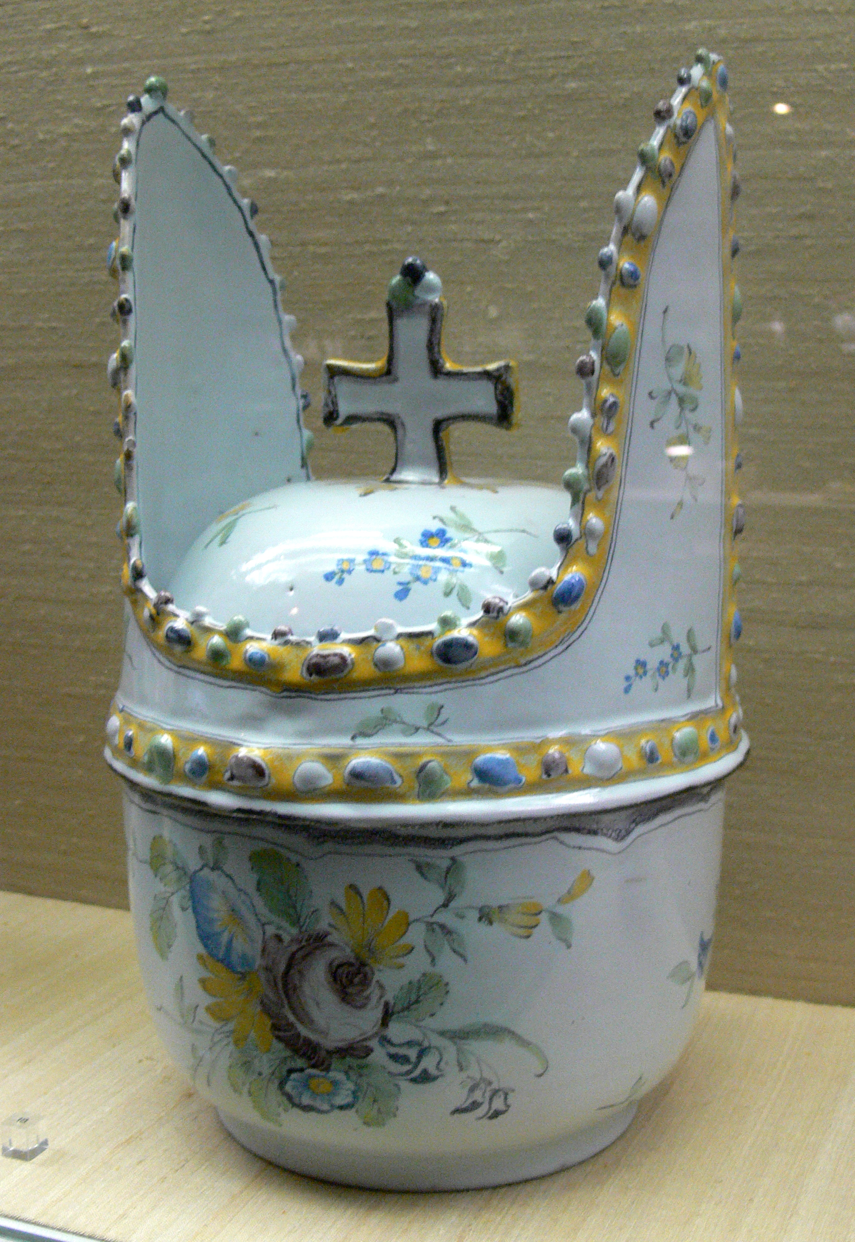 Terrine in Gestalt eines Bischofshuts (für das Bowlengetränk namens „Bischof“), Stralsund nach 1767 Kunstgewerbemuseum Berlin, Inv. Nr. 27,37